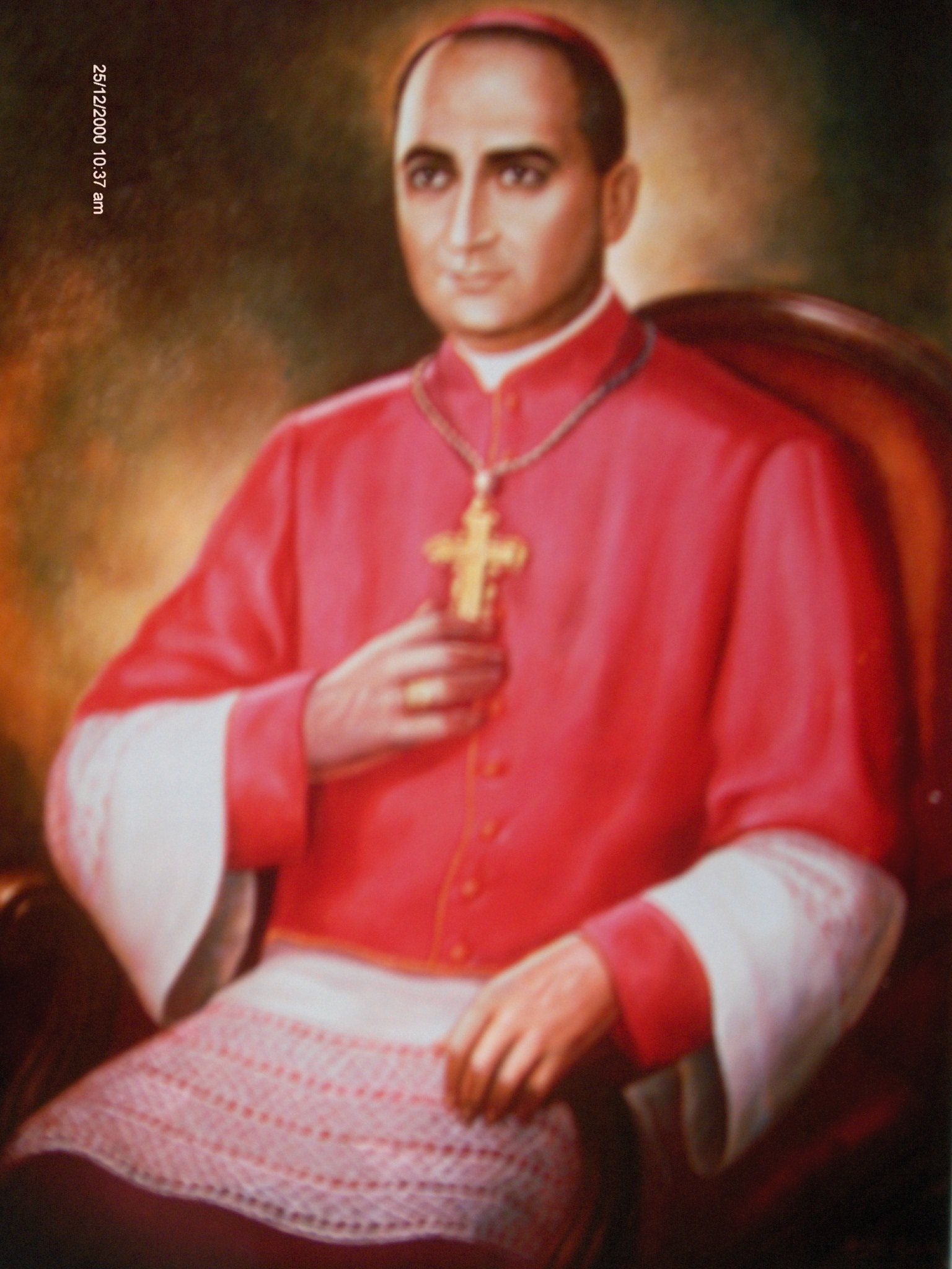 Oleo del Arzobispo Manuel Castro Ruiz (n. 1918)